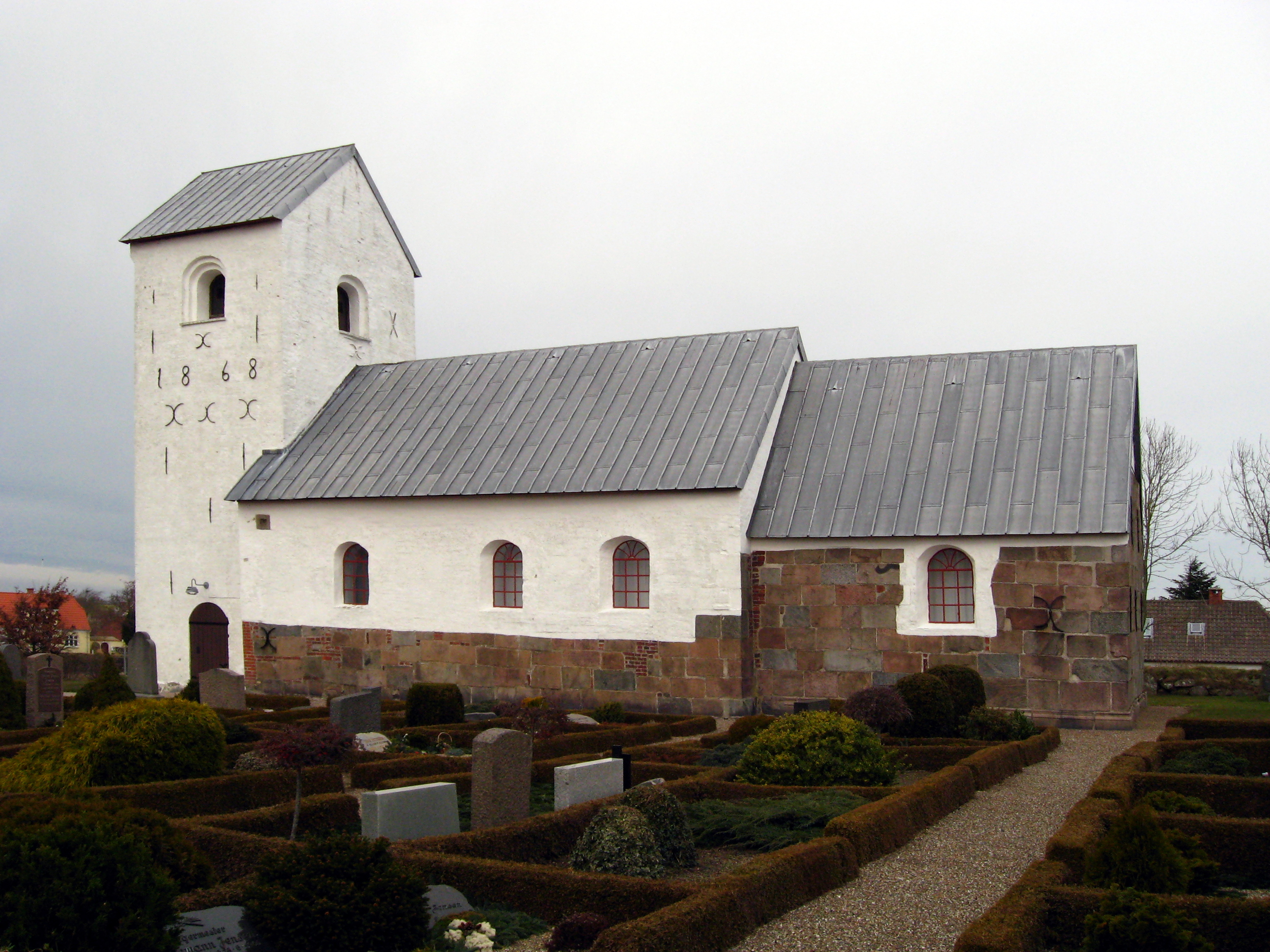 Em Kirke, Hjørring Kommune